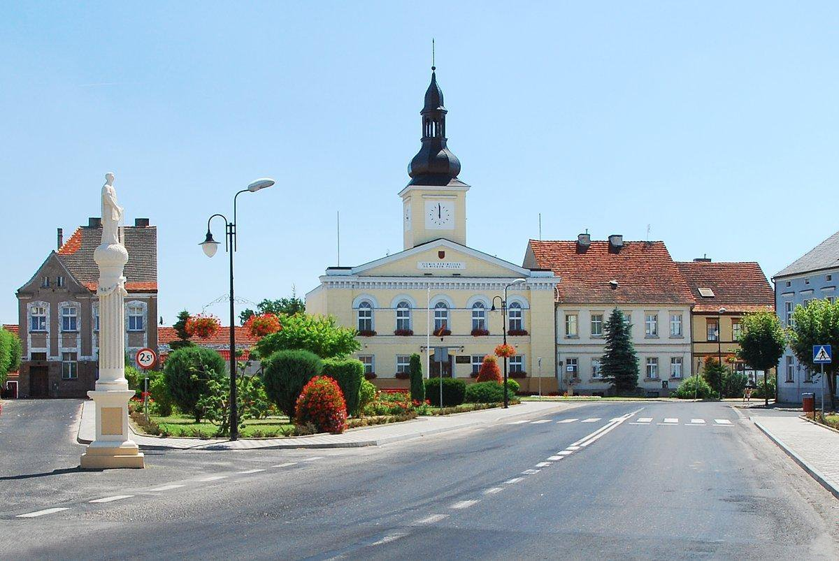 Rynek w Babimoście - widok w kierunku pierzei wschodniej. W centrum kadru Ratusz, po lewej kolumna św. Wawrzyńca. Dawniej wyglądało tak: .